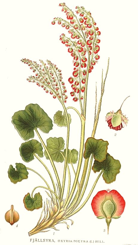 Original Description Fjällsyra, Oxyria digyna (L.) Hill.